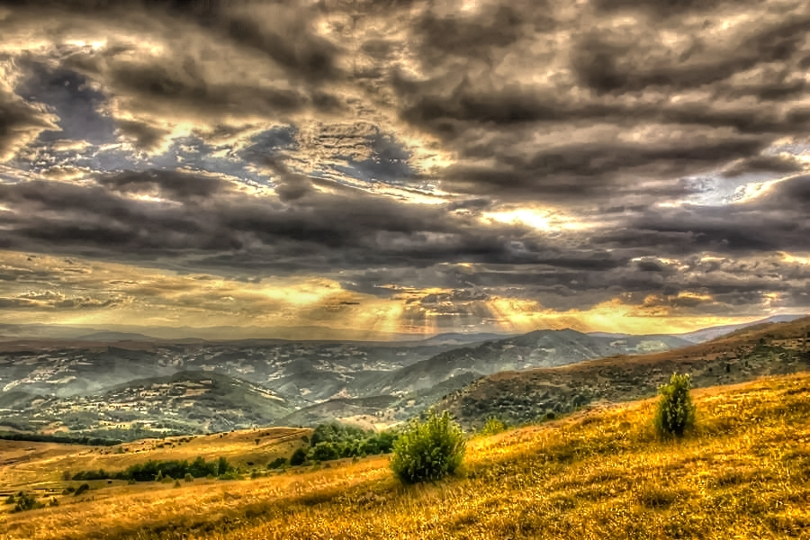 Srpskohrvatski / српскохрватски: пп13 Park prirode Golija